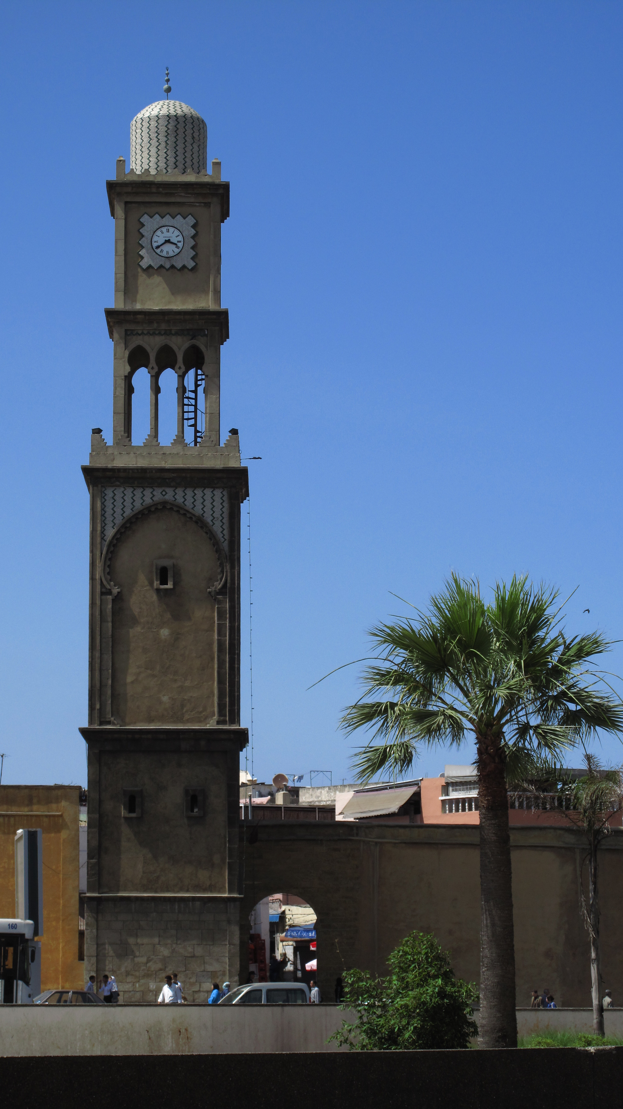 Tour horloge à l'entrée de la médina de Casablanca.